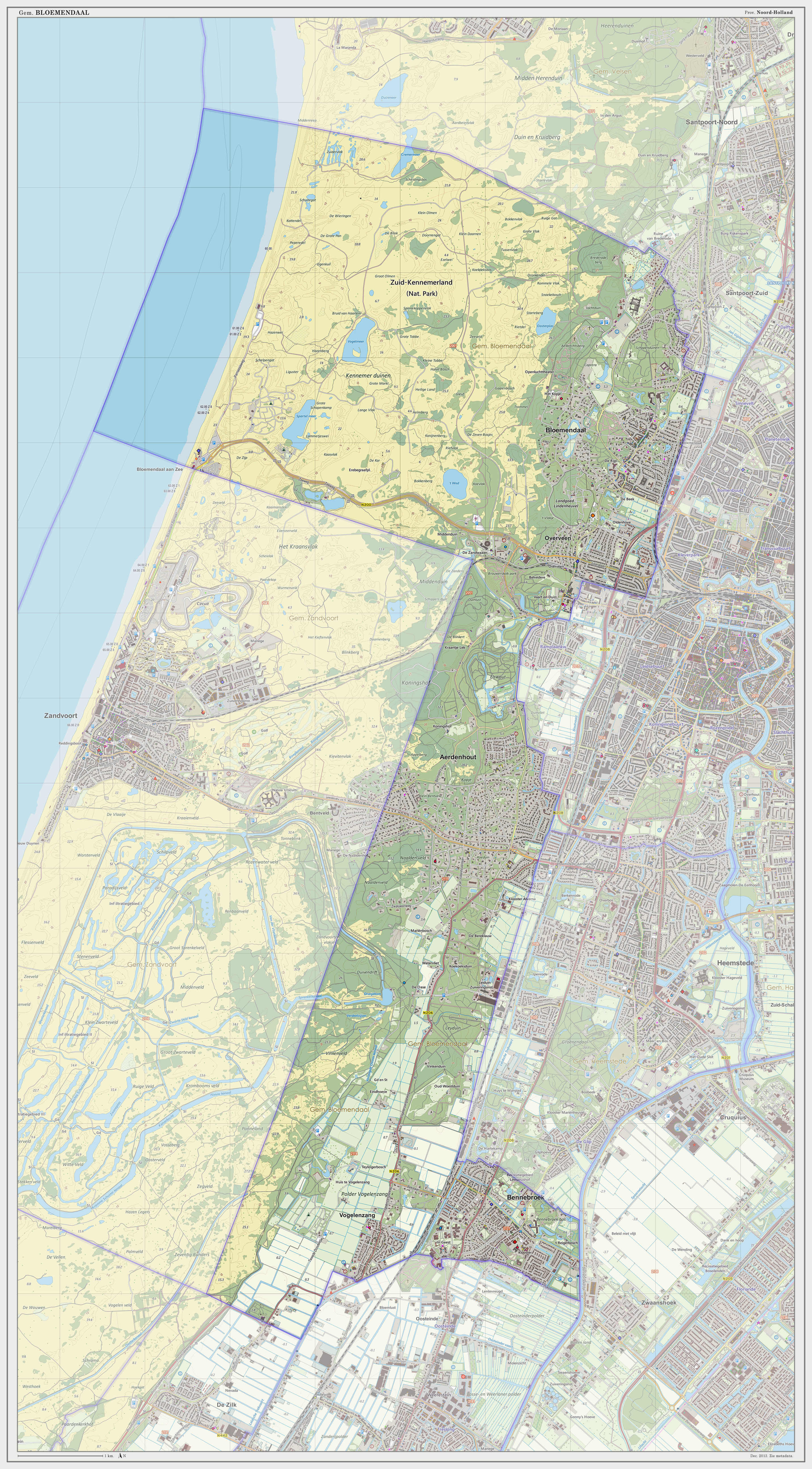 Topografische gemeentekaart. Kaartbeeld samengesteld op basis van de open geodata van de Top10NL en Top25namen (Basisregistratie Topografie, Kadaster 30-nov-2013), o.b.v. Creative Commons BY licentie. Gebouwvlakken uit Open Geodata BAG extract (8-dec-2013). Wegen uit de OpenStreetMap (15-dec-2013). Samenstelling en kleurenschema: Jan-Willem van Aalst, met QGIS2 en Adobe Photoshop. Zie ook de Legenda.